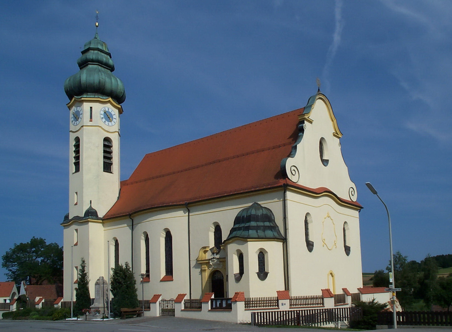 Hailing, Kath. Filialkirche St. Pauli Bekehrung, einheitlicher Neubau 1913; mit Ausstattung.